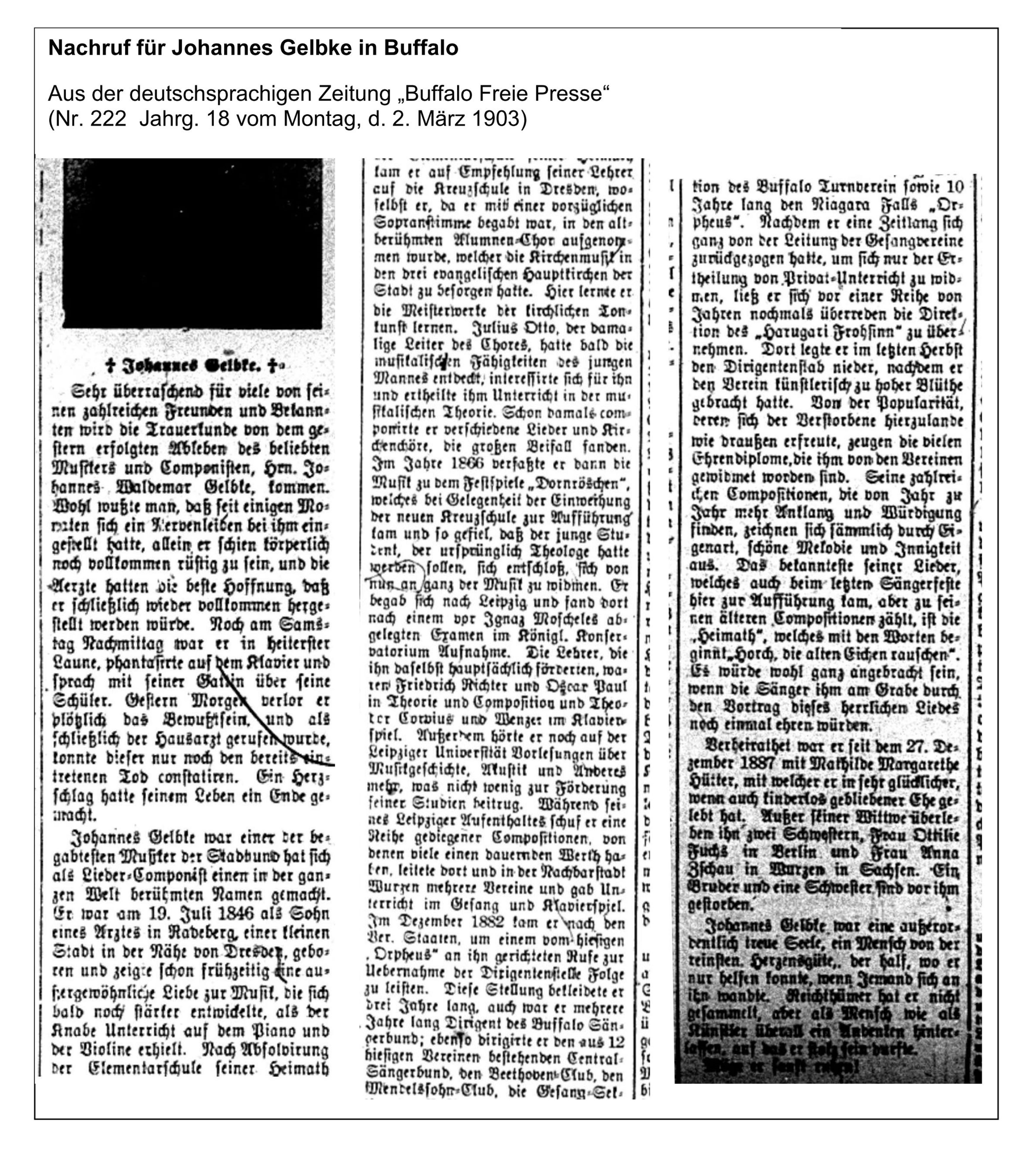 Redaktioneller Nachruf für Gelbke in Tageszeitung Buffalo Freie Presse v. 2.3.1903